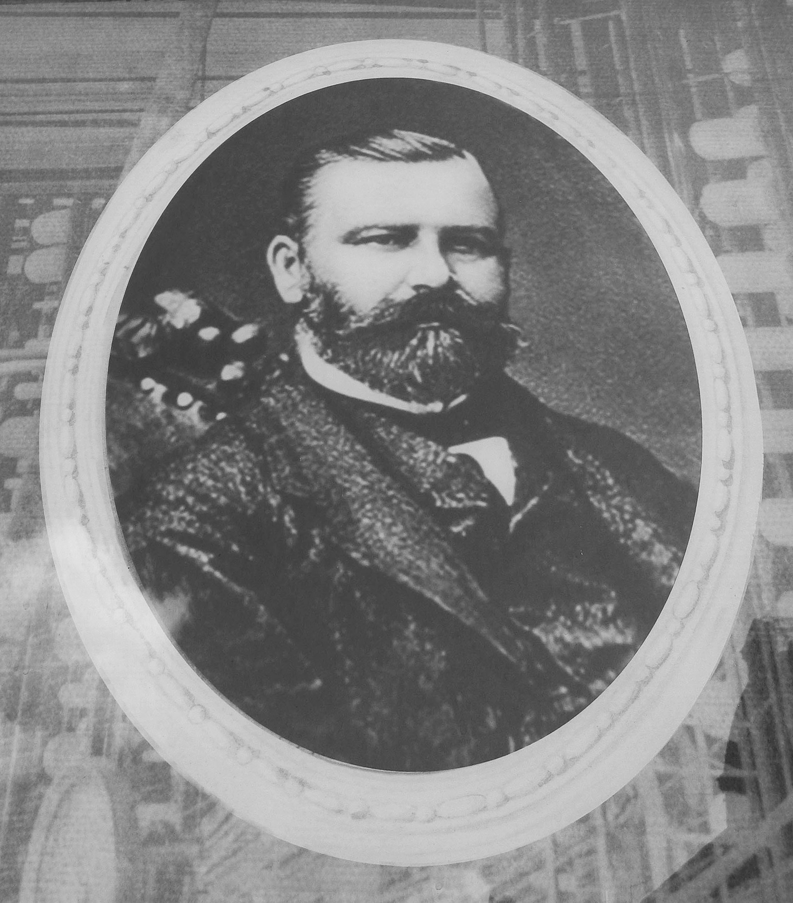 Karl Theodor Hielle (1822–1871), Besitzer der Textilfirmen Hielle & Dittrich in Schönlinde und Żyrardów